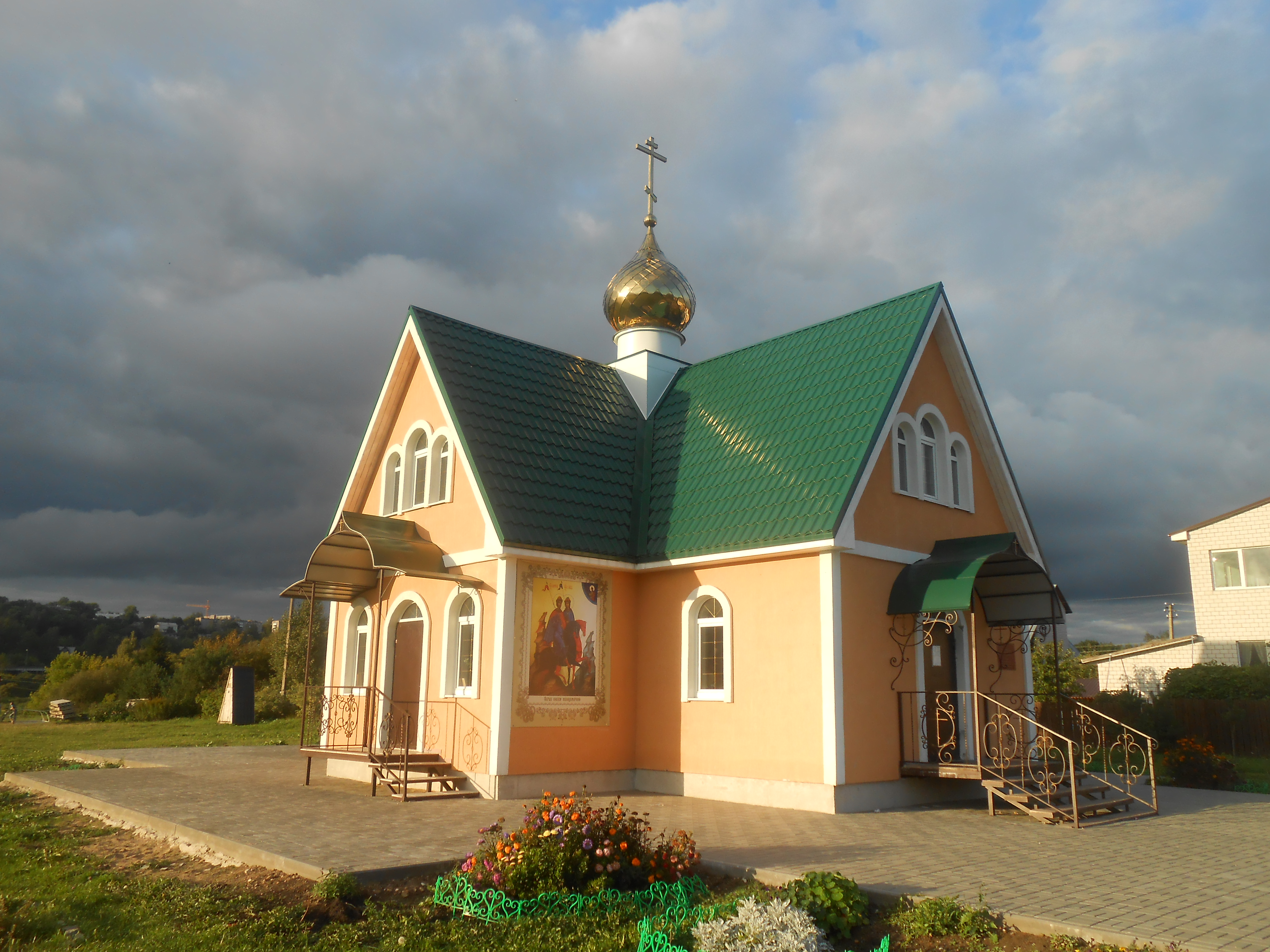 Борисоглебская церковь на месте бывшего Борисоглебского монастыря, Смядынь, Смоленск.